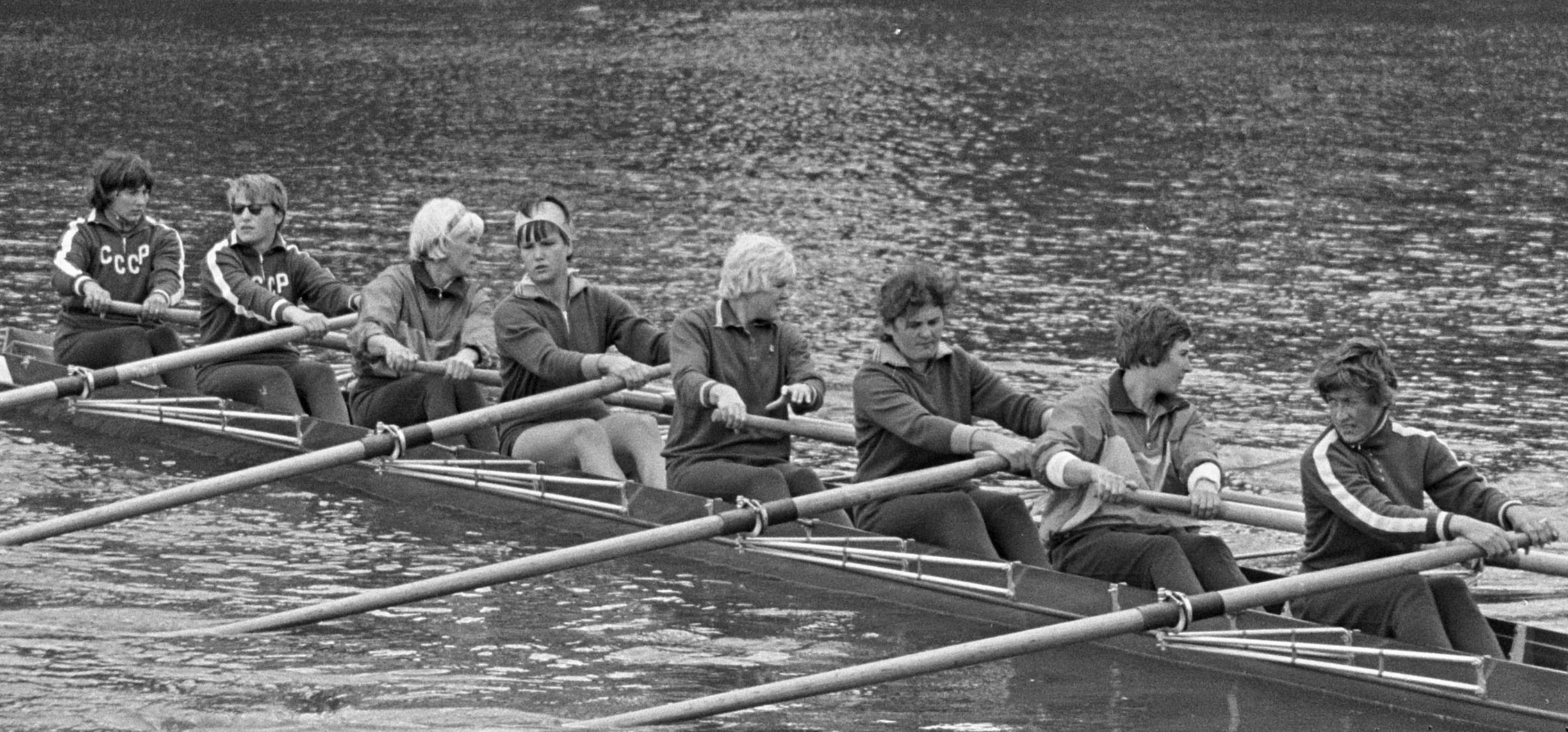 Europese Roeikampioenschappen, dames, de Russische achten tijdens training